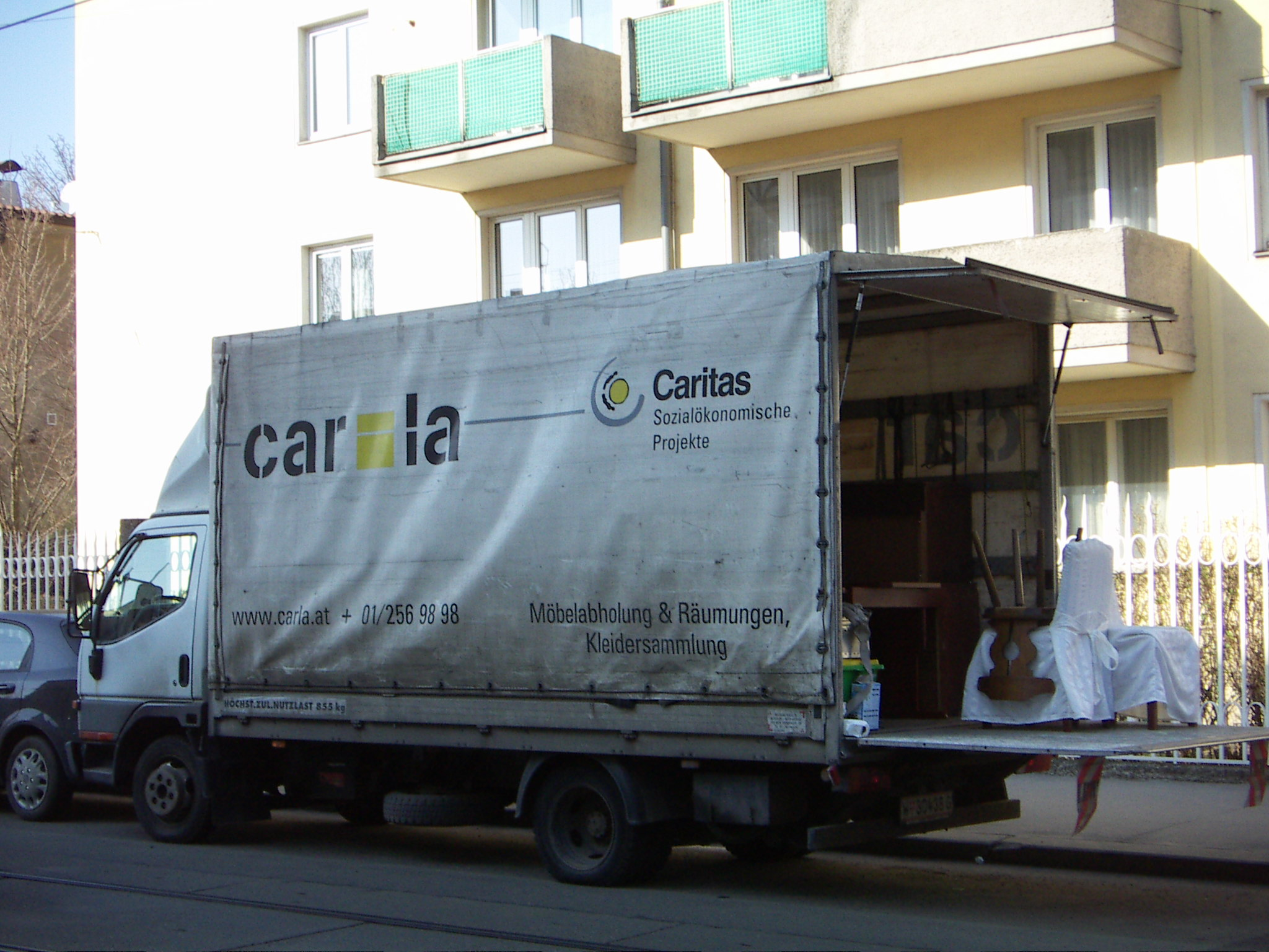 Carla, Caritas, Möbeltransport, Sechsmonatiges befristetes Dienstverhältnis bei Langzeitarbeitlosigkeit, Wien